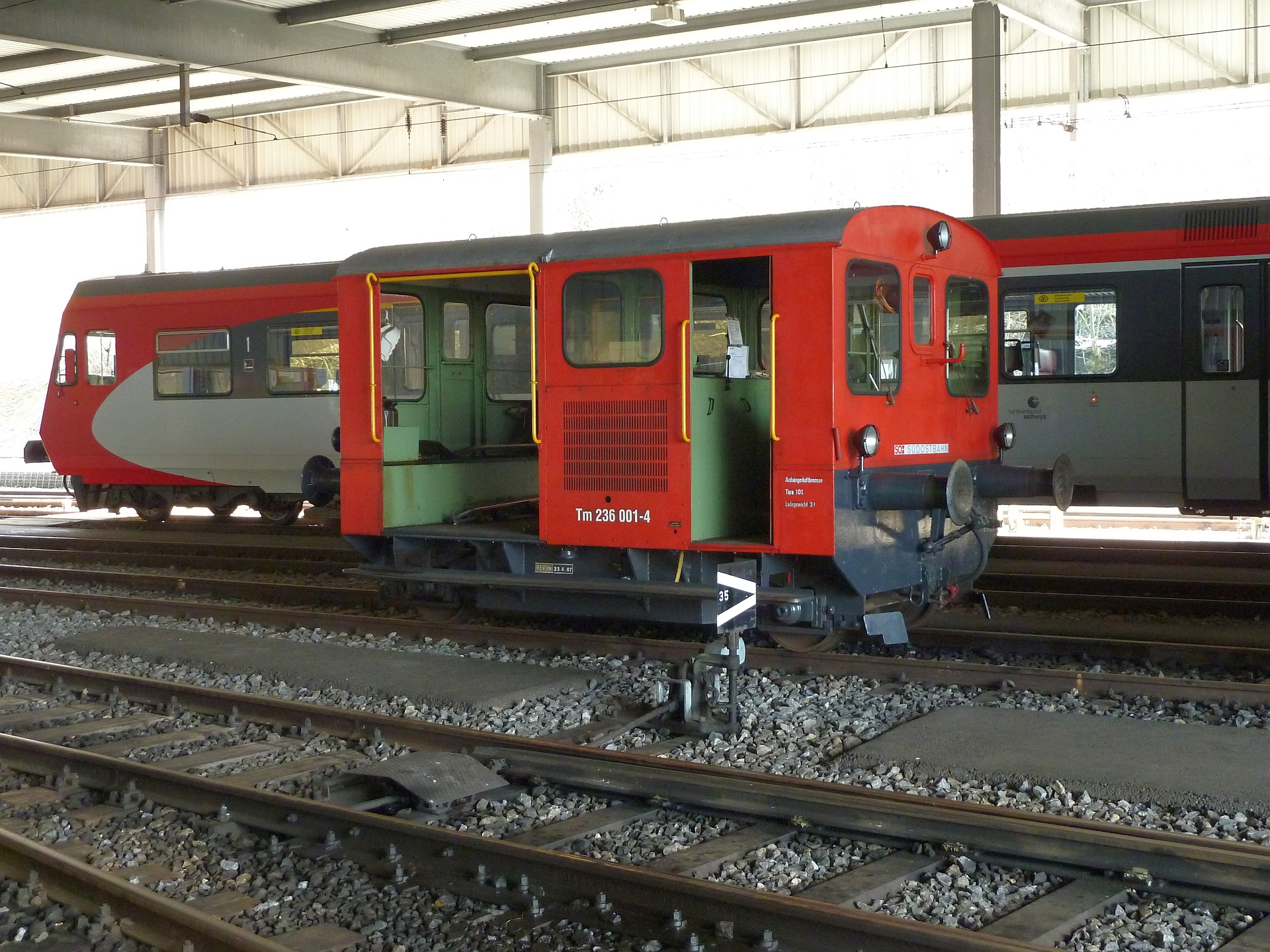 SOB Tm 236 001, Herisau, 03.03.2012